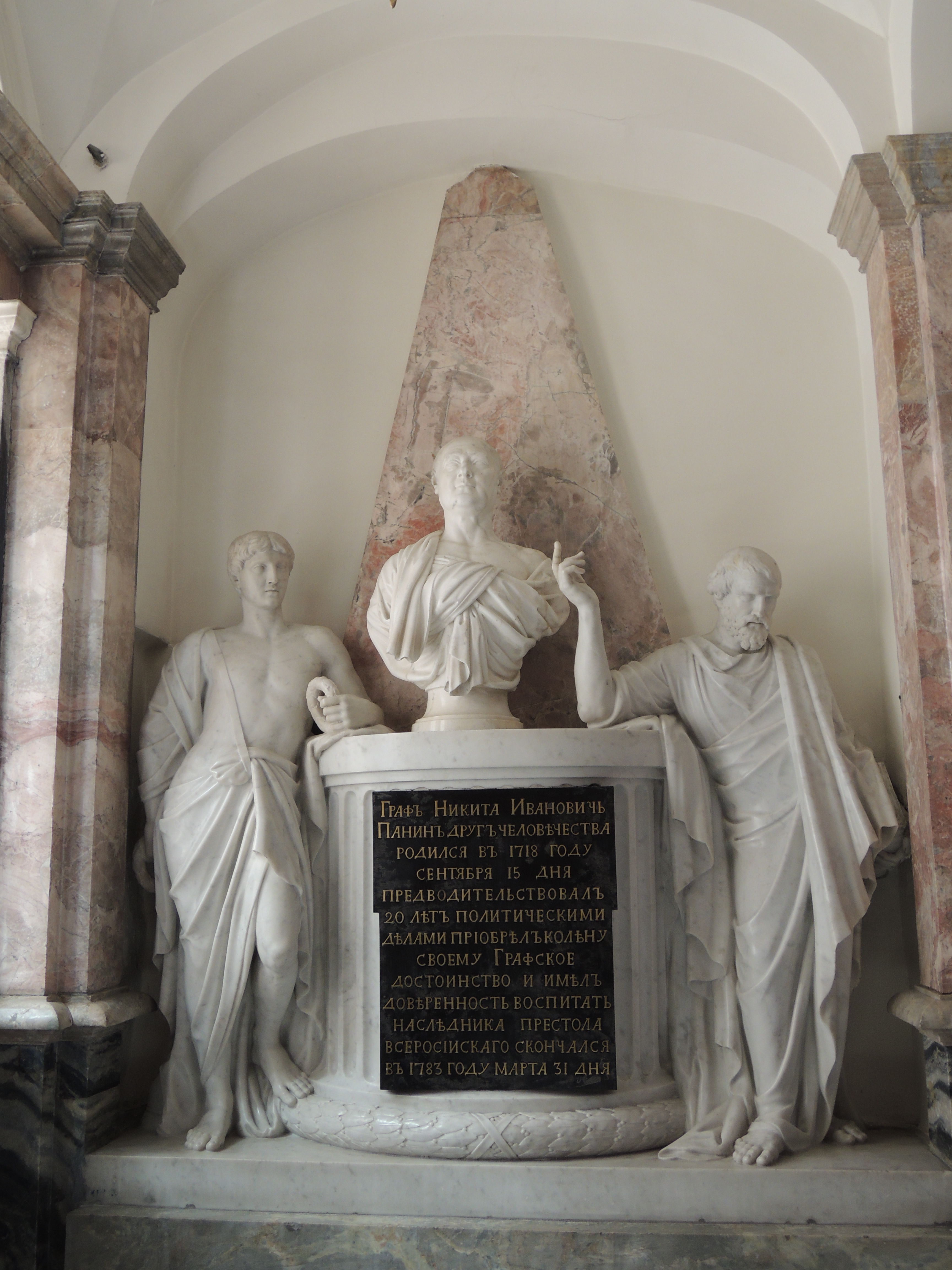 Благовещенская церковь Александро-Невской лавры. Панин Никита Иванович 15.09.1718-31.03.1783 Россия. Санкт-Петербург. Благовещенская усыпальница. Граф, государственный деятель, дипломат, воспитатель Павла I (с 1760 г.), почетный член Петербургский Академии наук (1776). С 1747 г. состоял посланником в Дании и Швеции. Участник дворцового переворота 1762 г., возведшего на престол Екатерину II. В 1763-1781 гг. руководил Коллегией иностранных дел. В 1797 г. Павел I (уже после смерти Екатерины II) смог увековечить свою признательность Н.И. Панину, воздвигнув ему памятник в церкви св. Магдалины в Павловске. Архитектурно оформленный притвор со скульптурным памятником. Скульптор И.П. Мартос (1754-1835), архитектор Д. Кваренги (1744-1817), 1780-е гг. Надпись: "Граф Никита Иванович Панин друг человечества родился в 1718 году сентября 15 дня предводительствовал 20 лет политическими делами приобрел колену своему графское достоинство и имел доверенность воспитать наследника престола Всероссийскаго скончался в 1783 году марта 31 дня". День рождения 15 сентября (по старому стилю). День памяти 31 марта (по старому стилю).